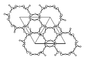 Cancrinit-Struktur